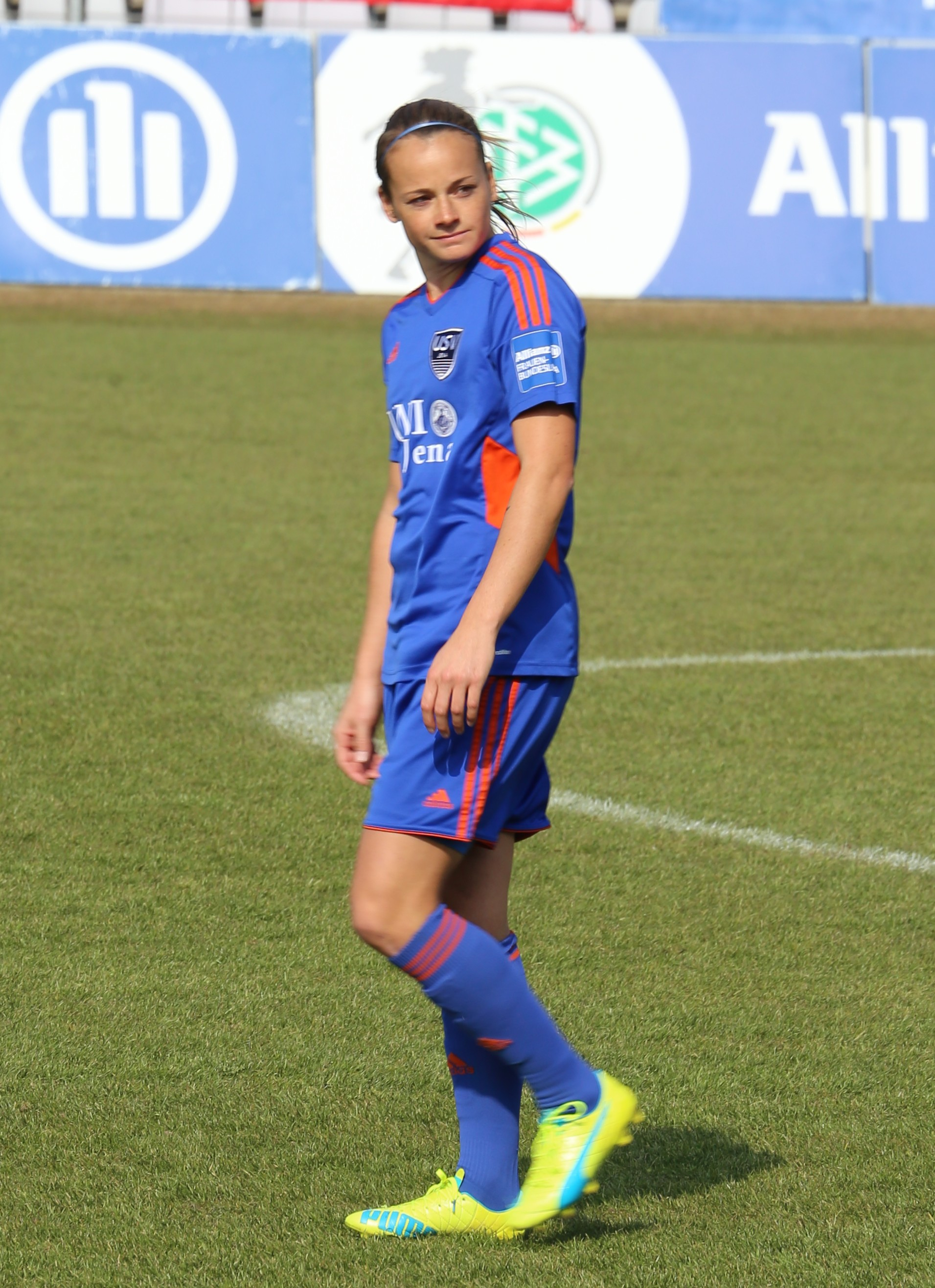 Ria Percival (FF USV Jena) beim Frauen-Bundesliga-Spiel FC Bayern München gegen FF USV Jena am 19. März 2016 im Stadion an der Grünwalder Straße (Ergebnis war 5:1).